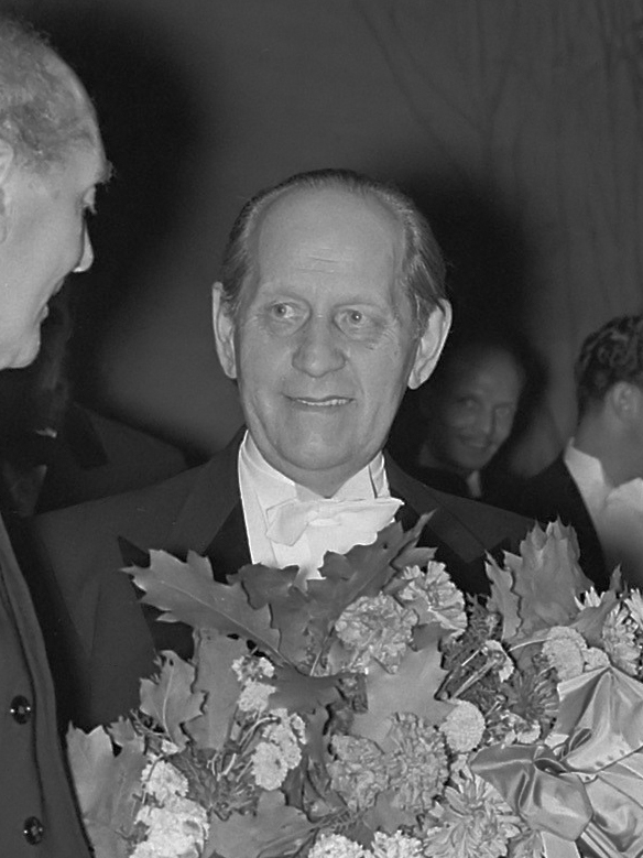 Huldiging Peter Scharoff Stadschouwburg 2 oktober 1954